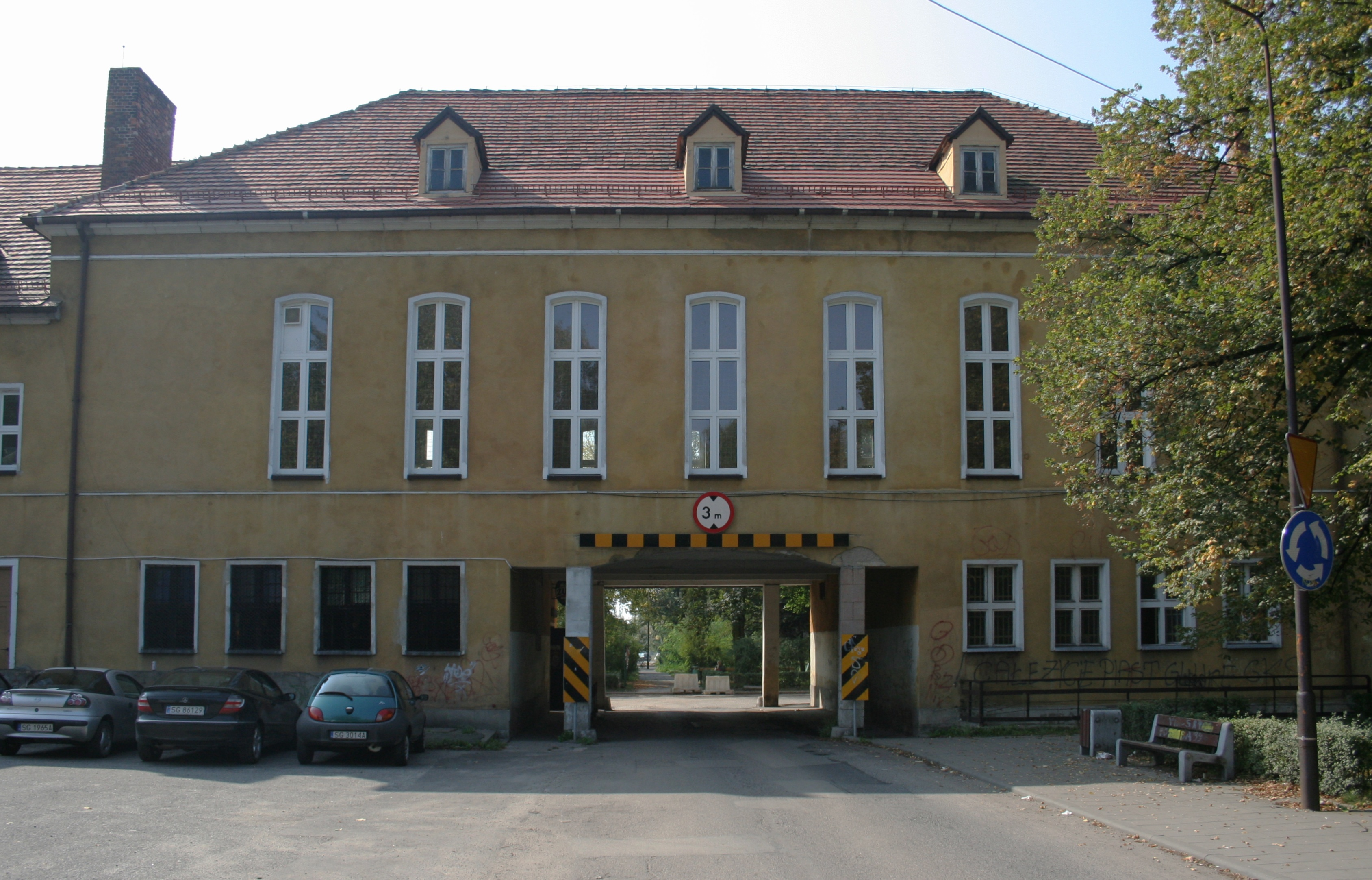 Widok od zewnątrz na bramę wjazdową do Wilczego Gardła, dzielnicy Gliwic, woj. śląskie